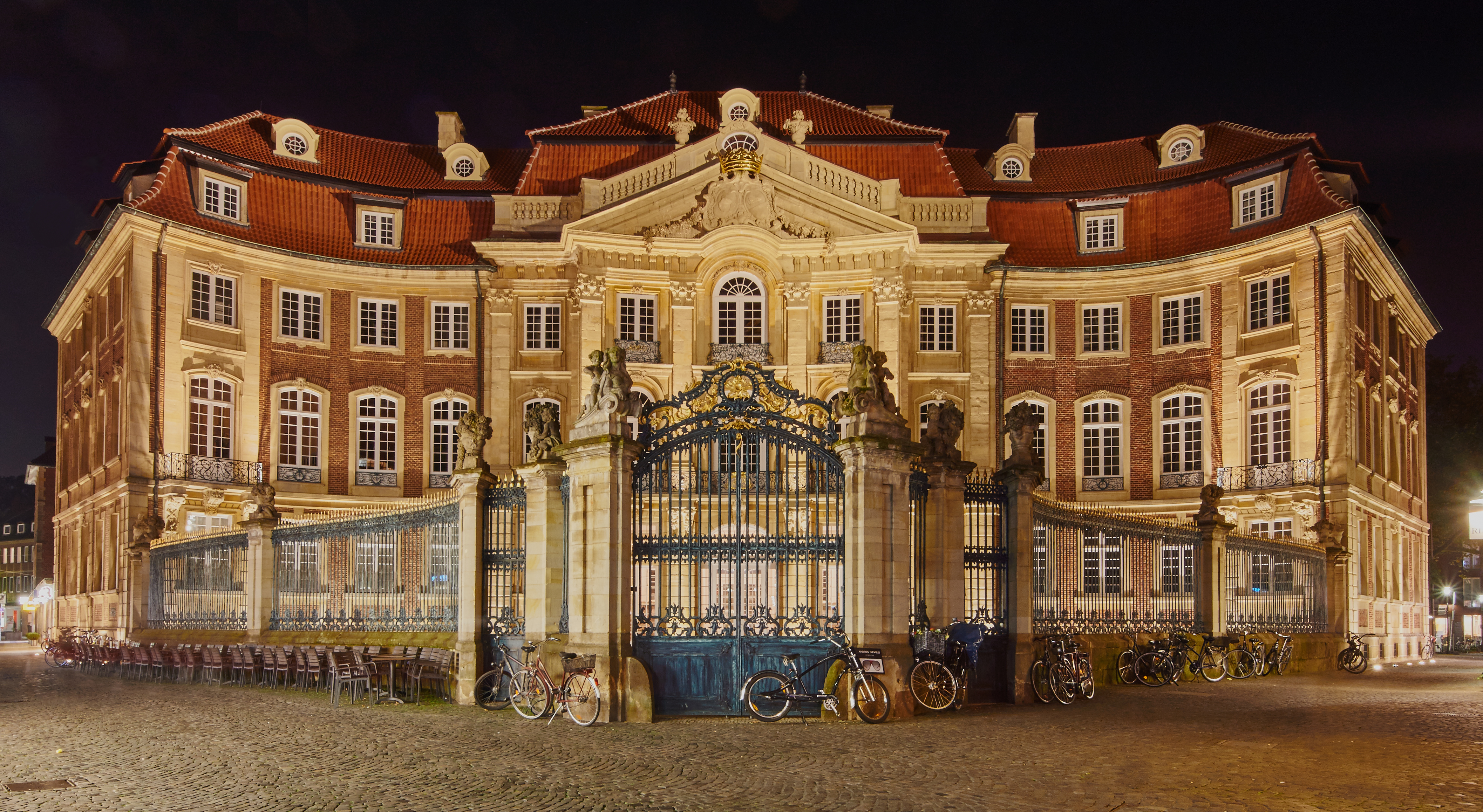 Der Erbdrostenhof in Münster ist ein zwischen 1753 und 1757 nach Plänen von Johann Conrad Schlaun errichtetes Adelspalais an der Salzstraße. Der Erbdrostenhof ist als Baudenkmal in die Denkmalliste von Münster eingetragen. This is a photograph of an architectural monument.It is on the list of cultural monuments of Münster (Westfalen)